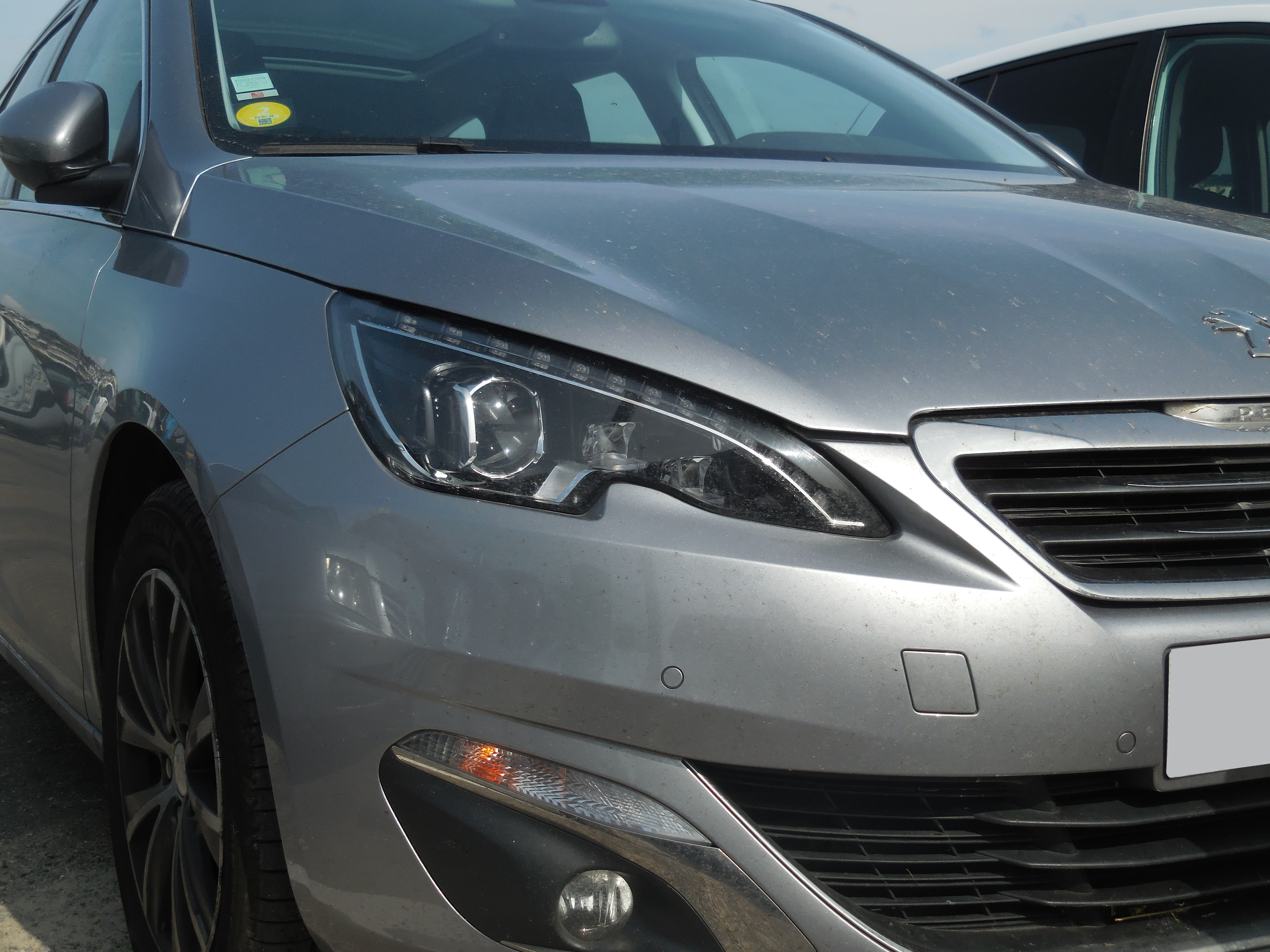 Peugeot 308 II - phares full LED